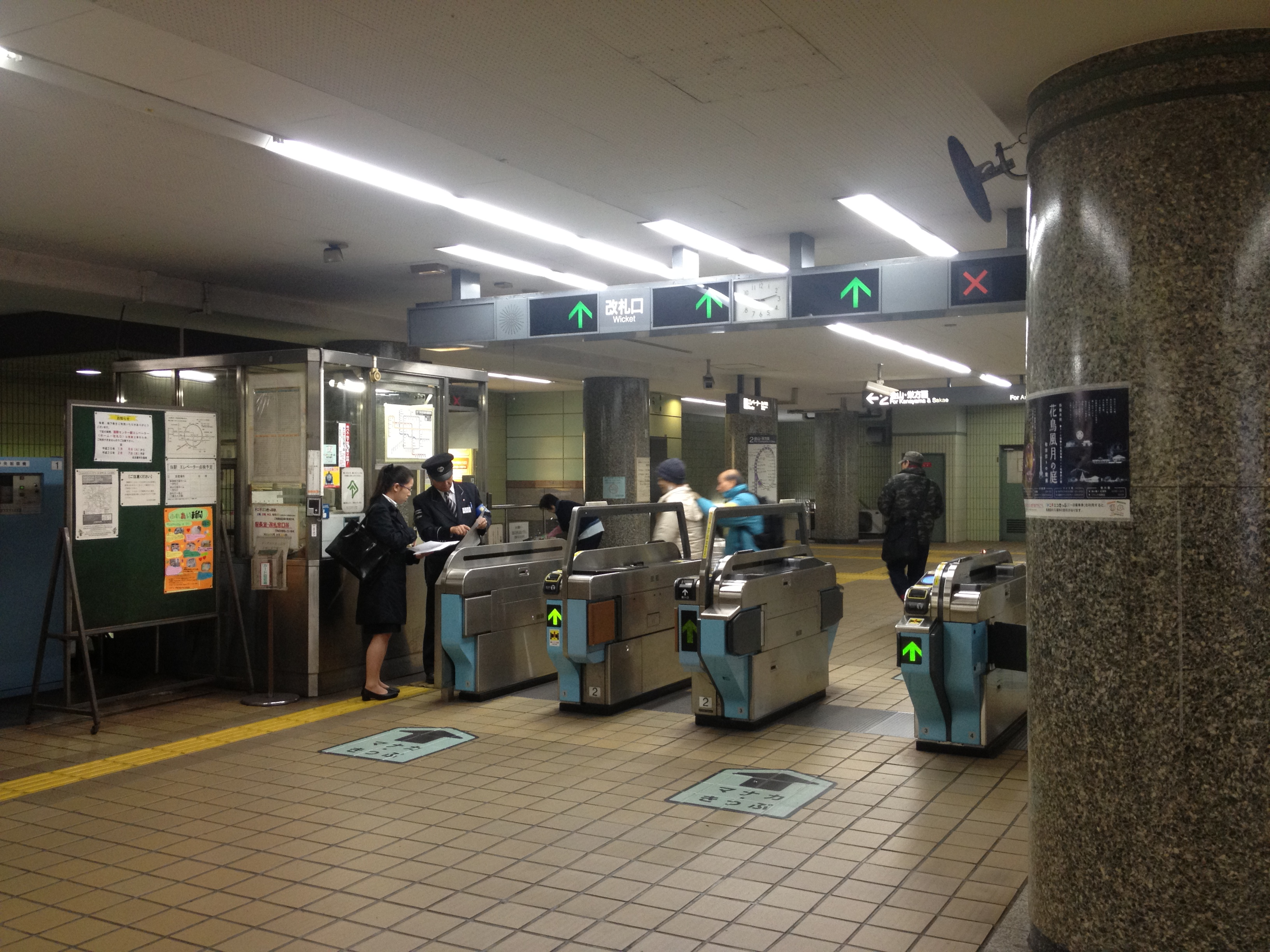 名古屋市営地下鉄 神宮西駅 改札口